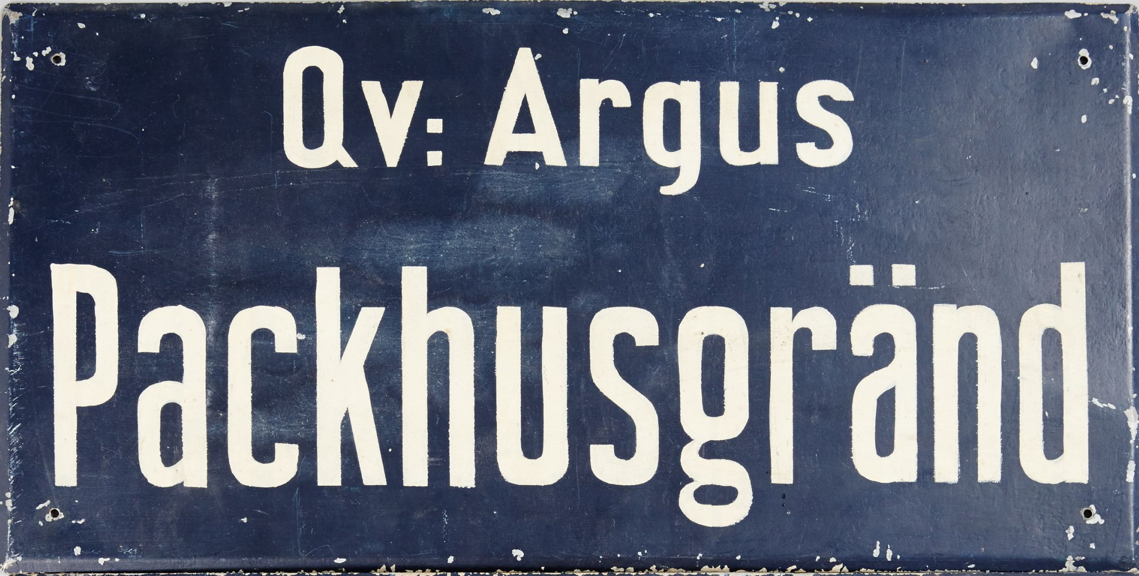 Äldre gatuskylt i Stockholm "Kvarteret Argus, Packhusgränd"